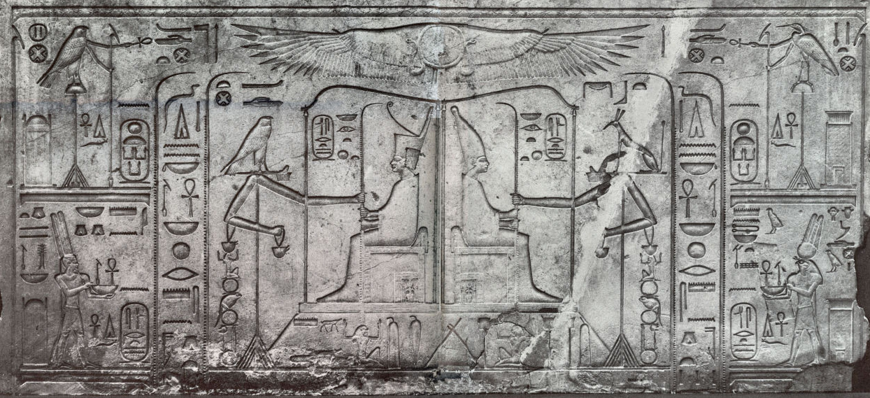 Bloc trouvé dans la région thébaine et montrant le rituel du heb Sed de Sesostris III - XIIe dynastie égyptienne.